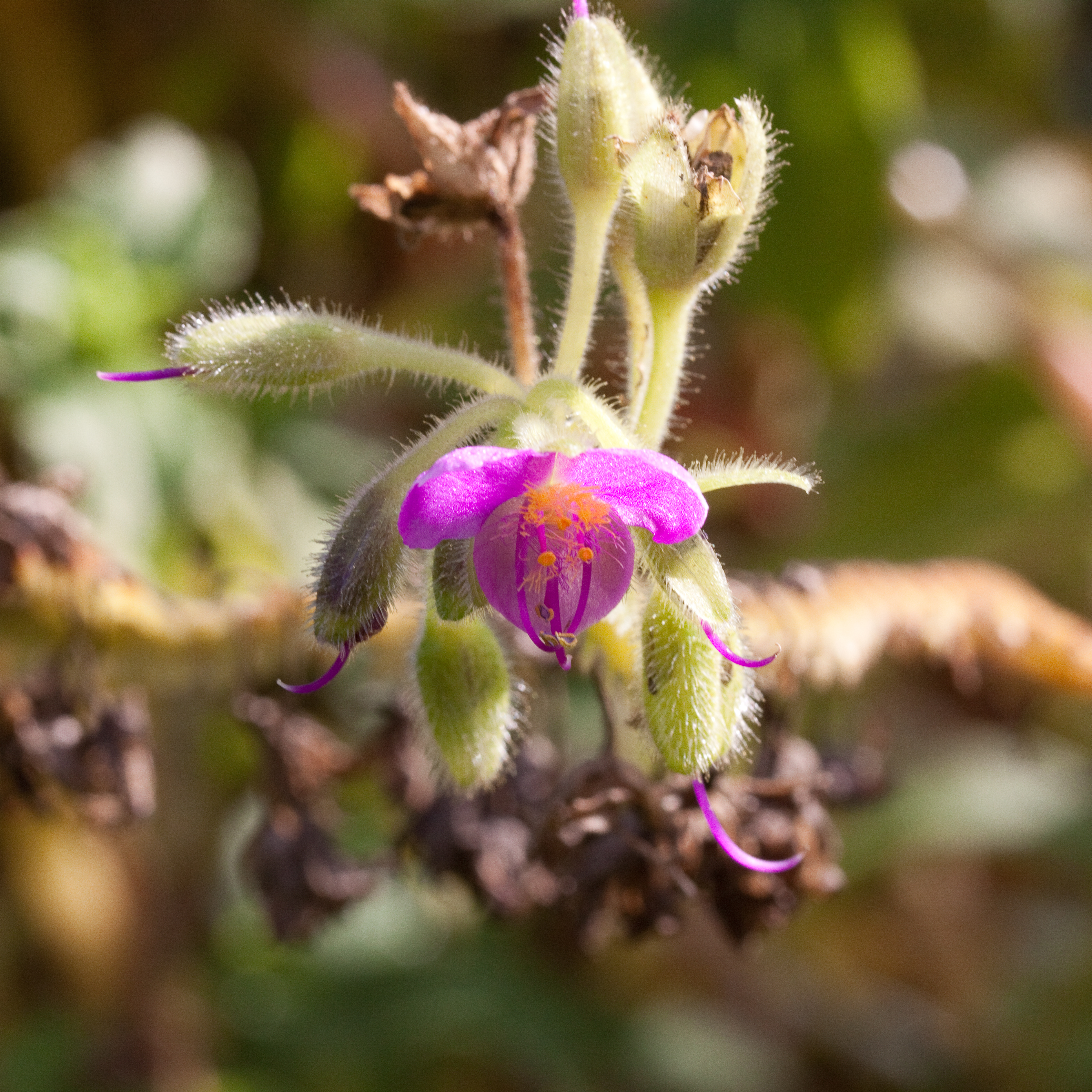 Fleur de Tinantia erecta - Jardin botanique de Strasbourg - France